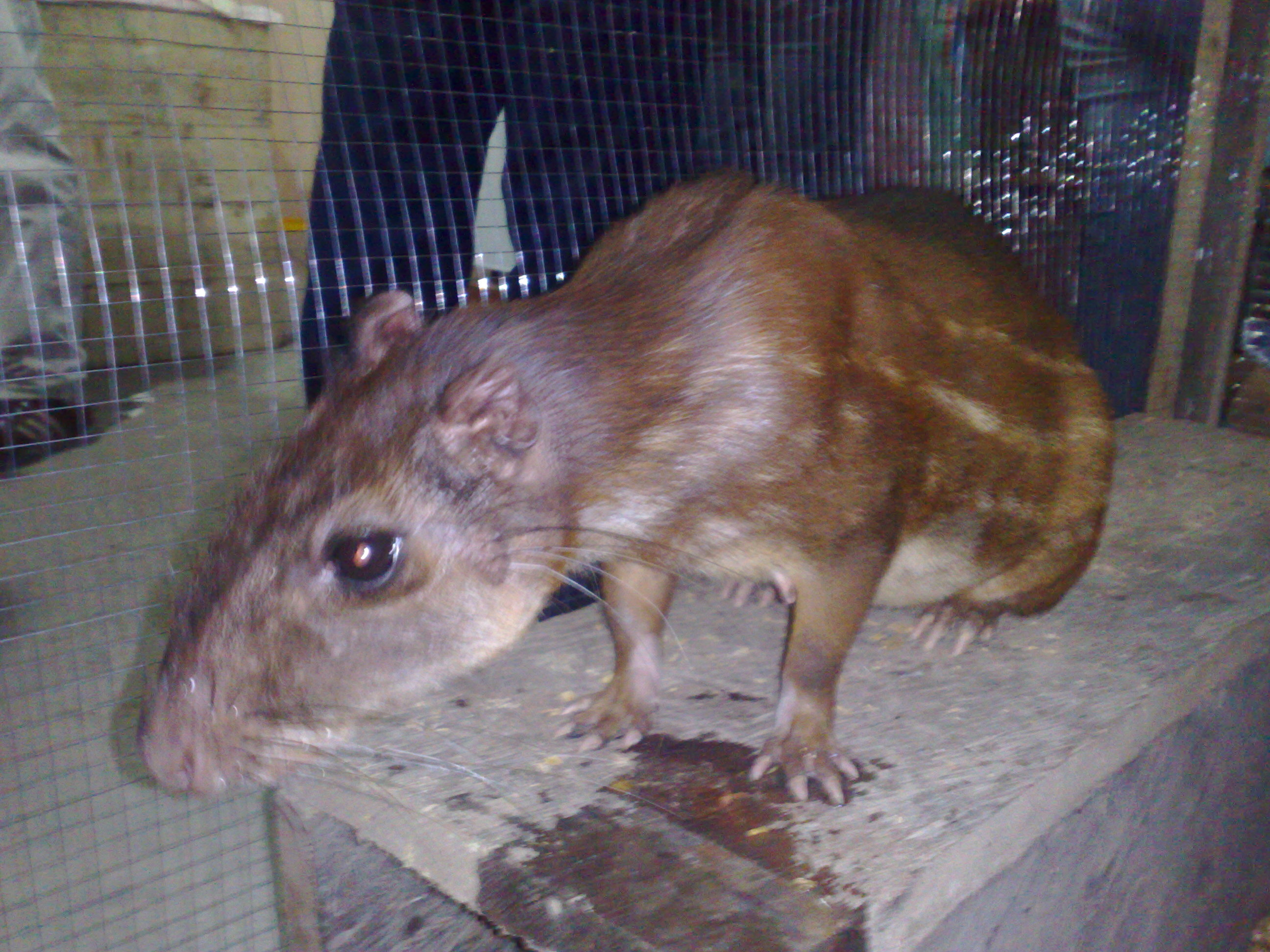 Es un animal silvestre pero se le puede domesticar es parecido a un cuy gigante su pelaje es corto y bien pegado a su piel